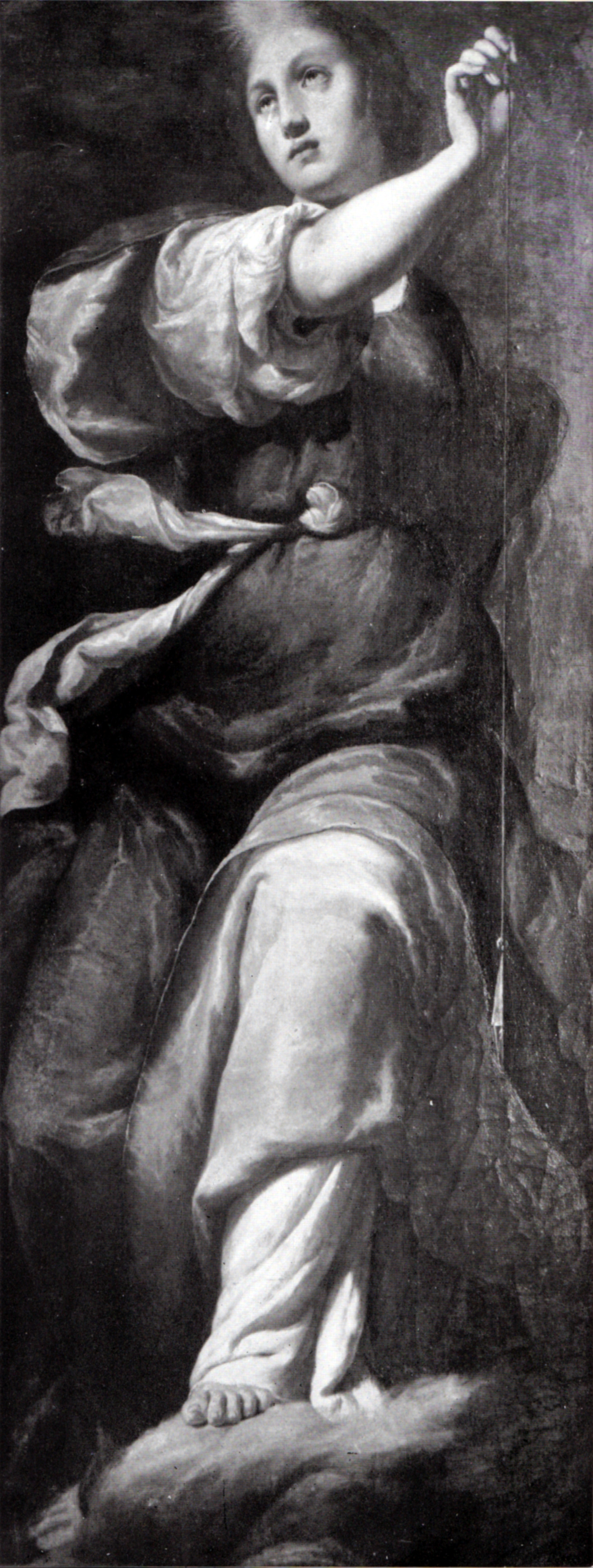 Jacopo vignali, michelangelo e carlo V.jpg